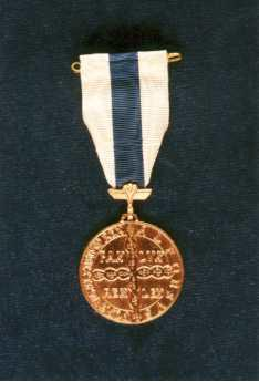 Medalha de D. Afonso Henriques 4ª Classe